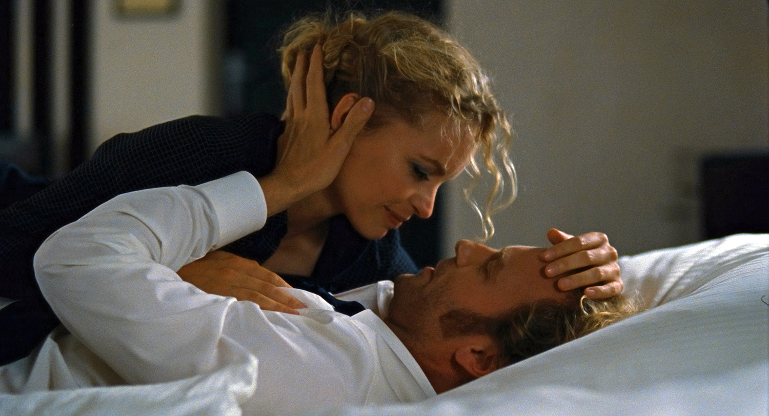 Nina Hoss und Mark Waschke in Barbara, 2012